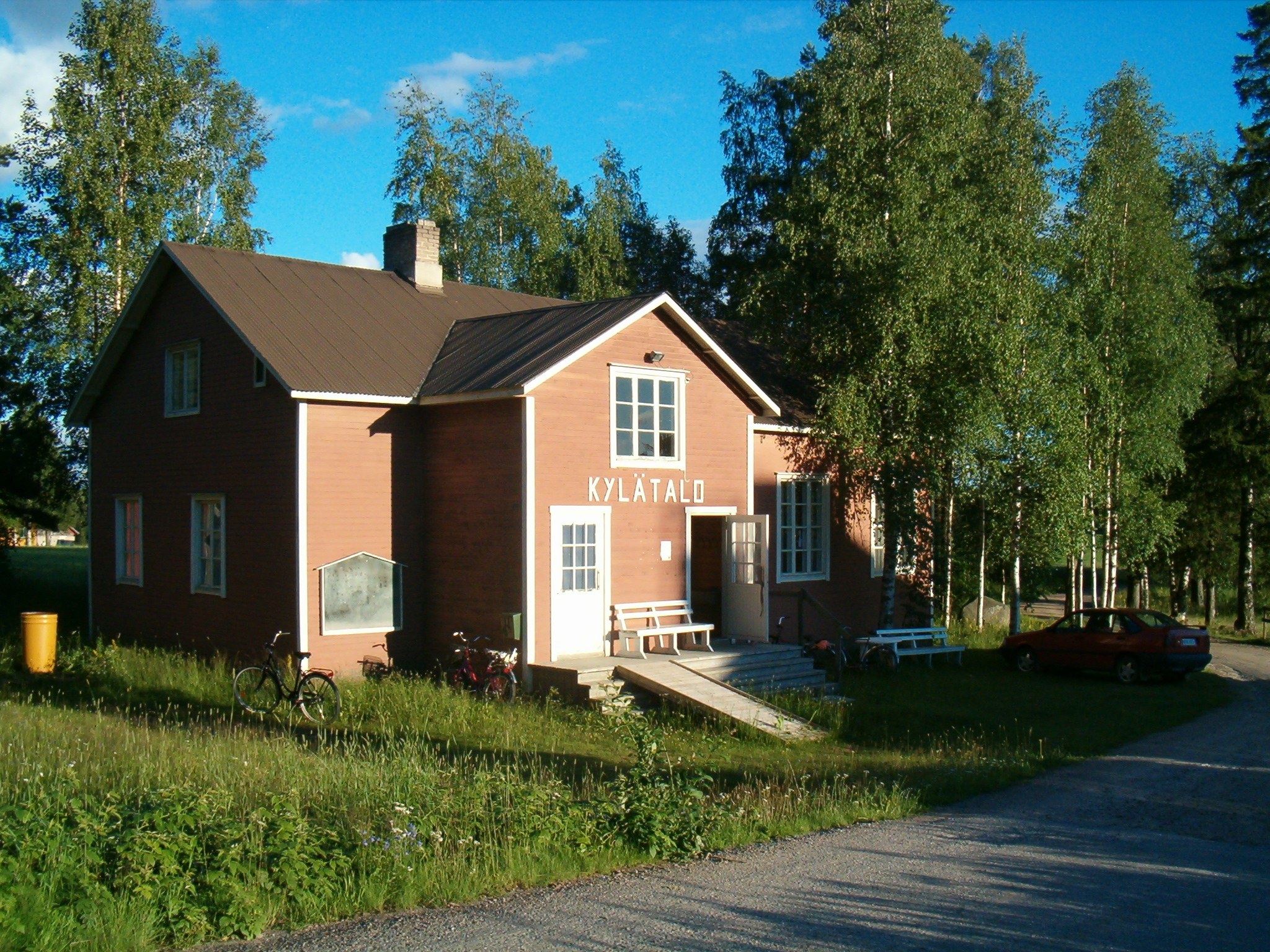 Tavastkengän kylätalo heinäkuussa 2007.